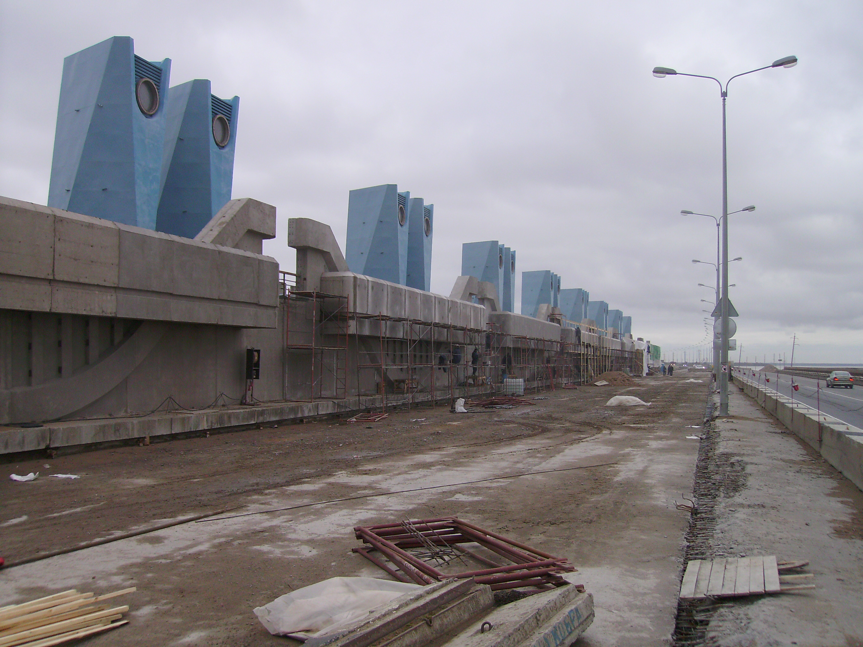 Комплекс защитных сооружений Санкт-Петербурга от наводнений (Saint Petersburg Dam)